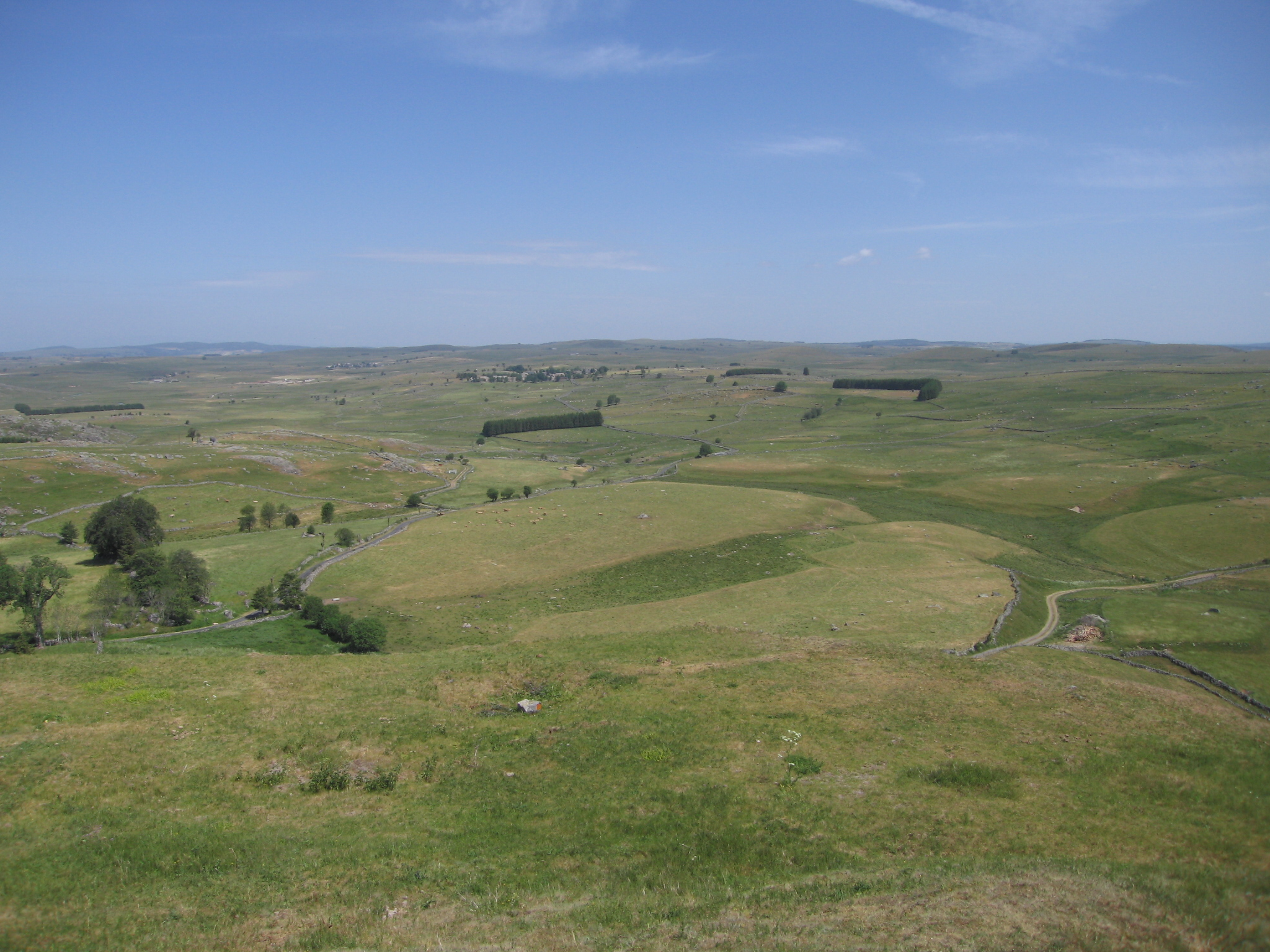 Aubrac - Rieutort